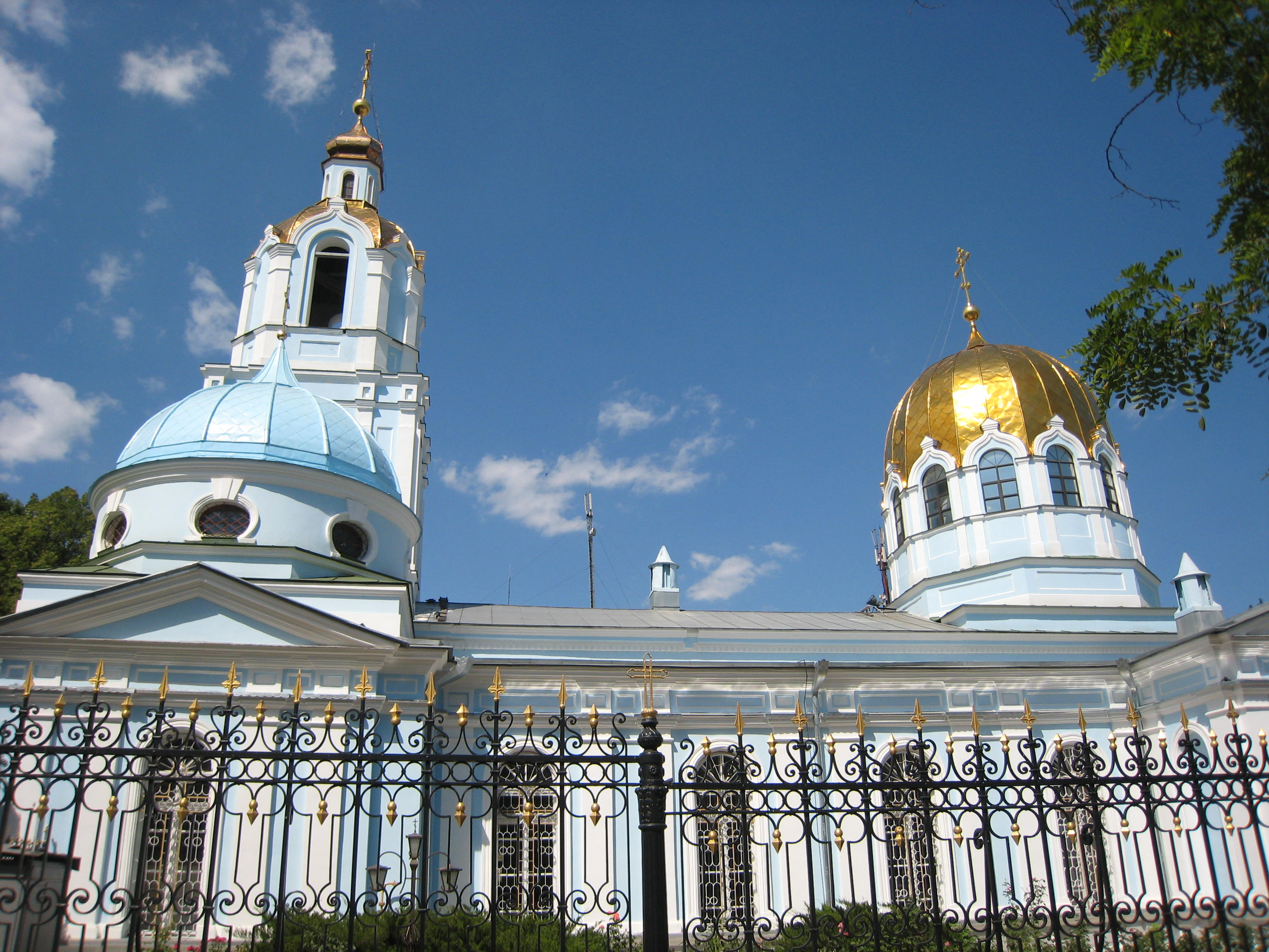 Кафедральный собор Рождества Божьей матери